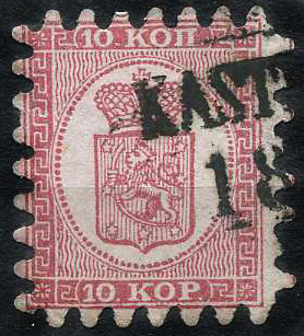 Марка Великого княжества Финляндского, Второй выпуск, 1860, 10 коп.